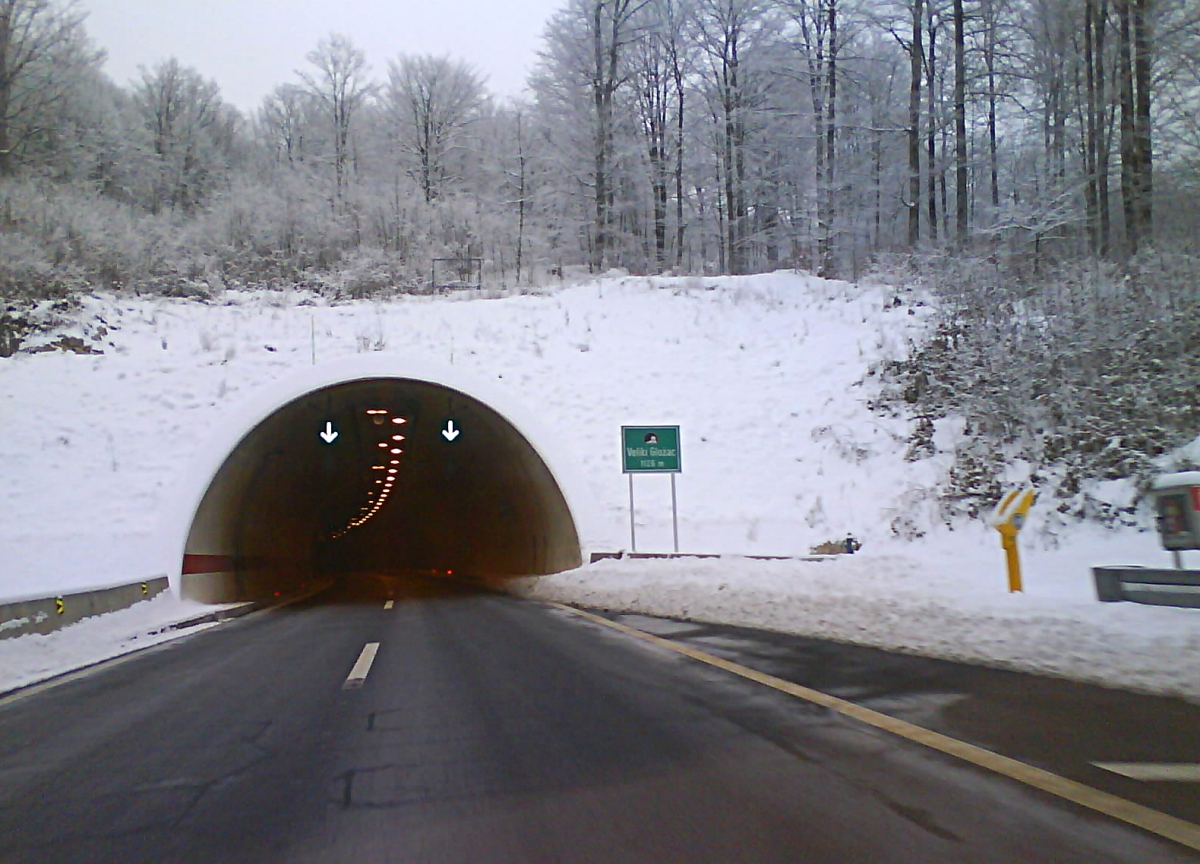 Autocesta A6